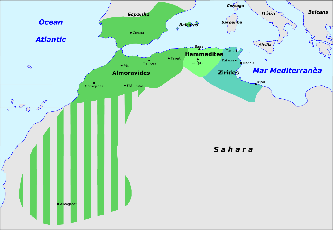 Magrèb en 1100